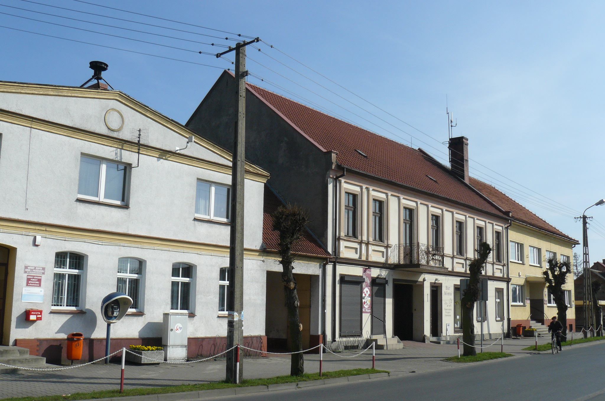 Rozdrażew - rynek.